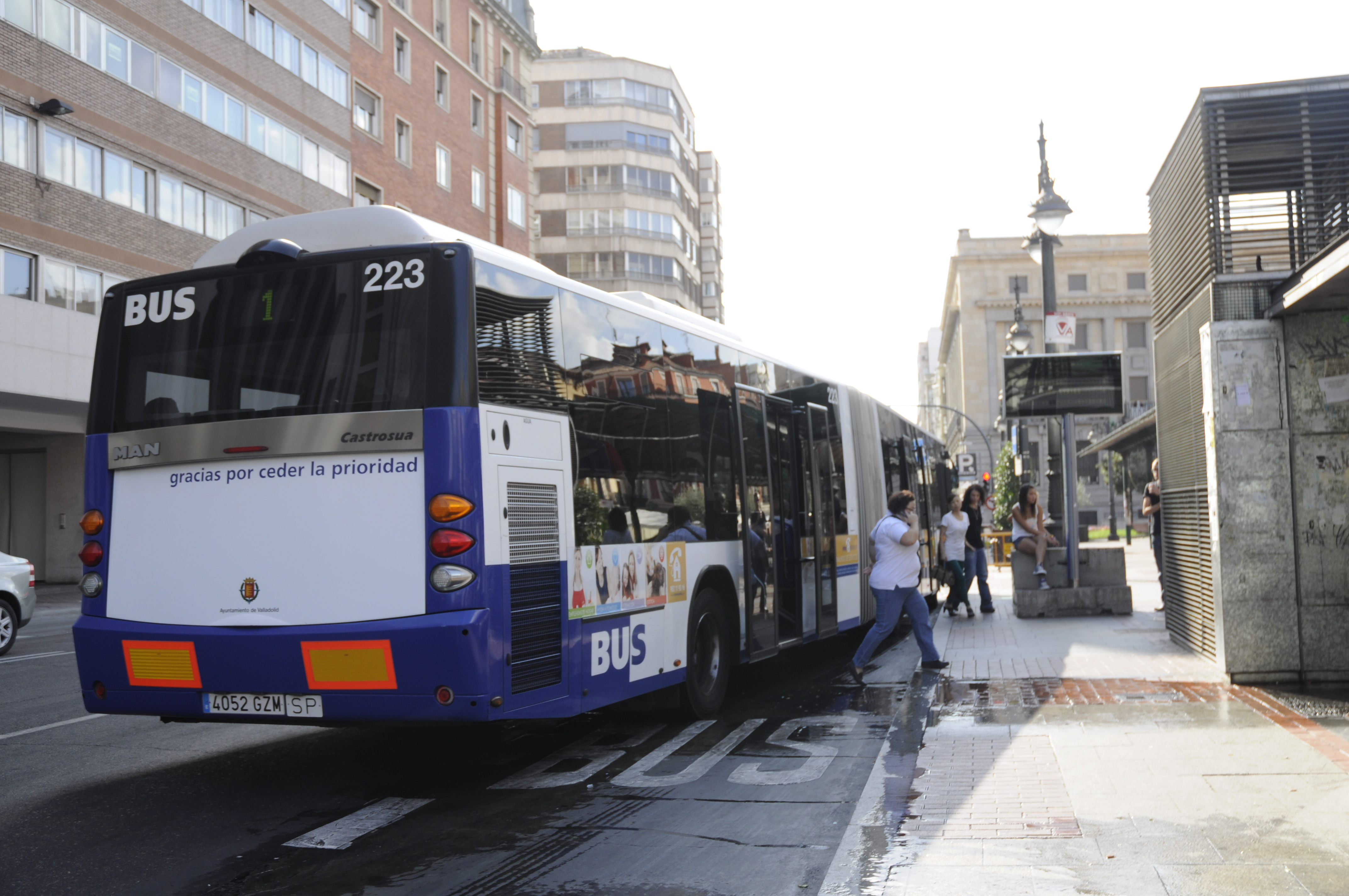 MAN NG320 Carrocería Castrosúa City Versus articulado